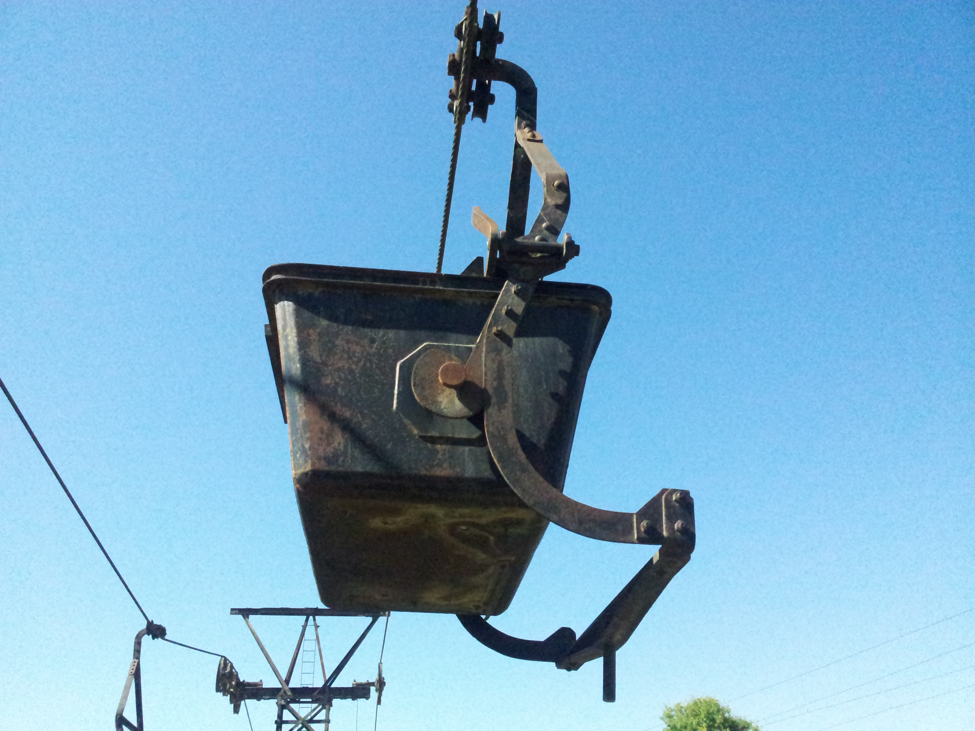 Ancienne benne du transporteur aérien Maxéville-Dombasle exposée à l'entrée de la carrière Solvay de Saint-Germain-sur-Meuse.